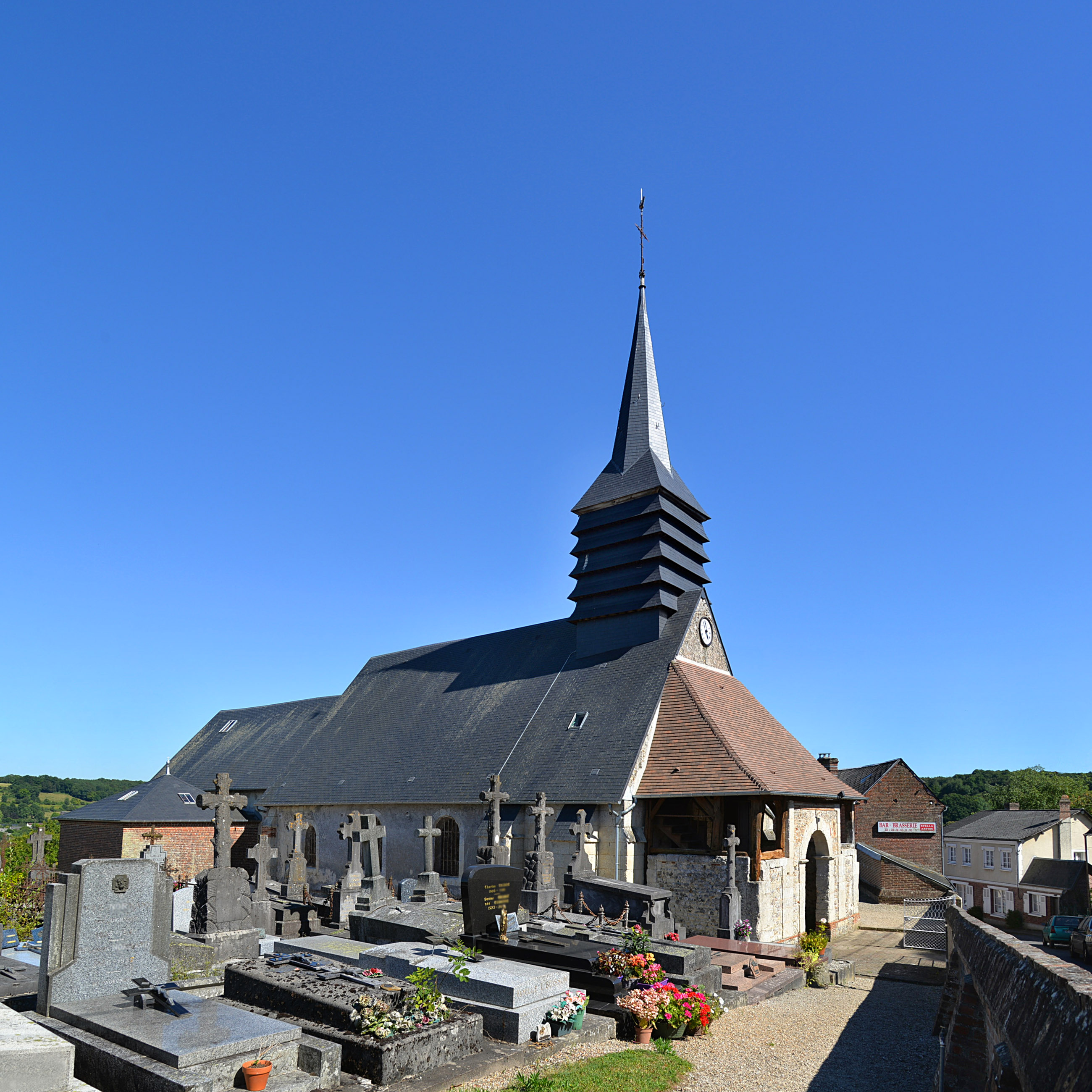 Saint-Pierre-de-Mailloc (Calvados)